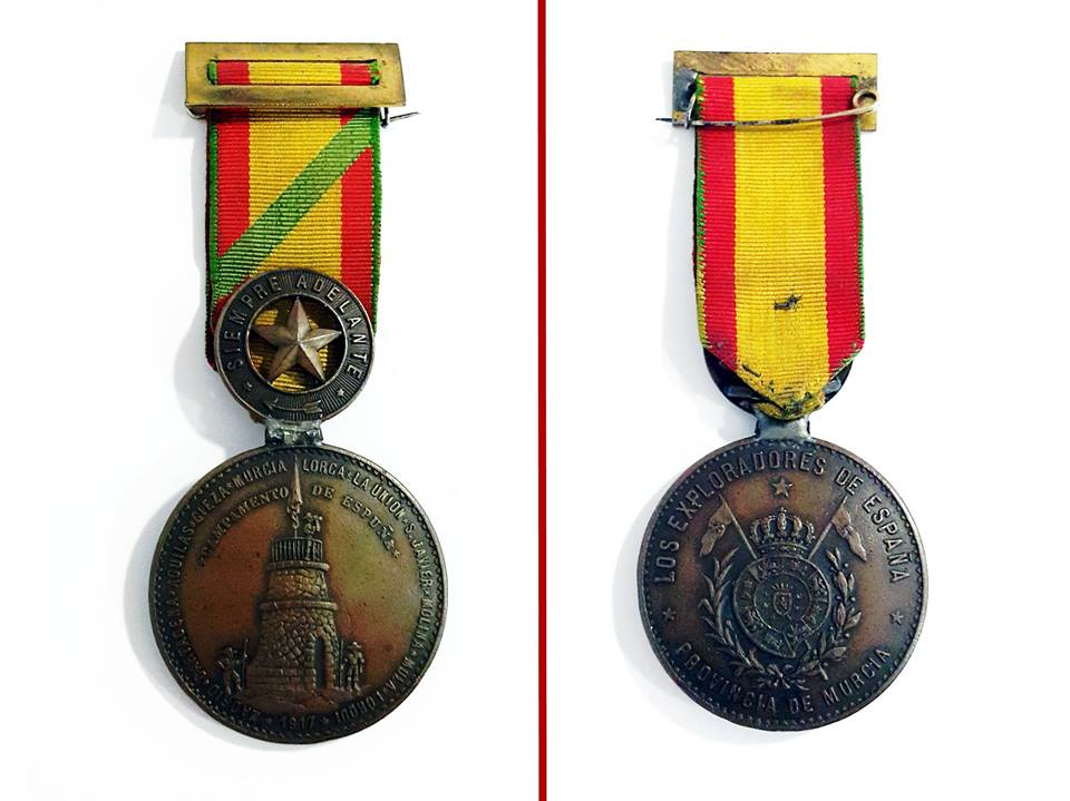 Anverso y Reverso de la medalla de los exploradores para el campamento de Sierra Espuña en Murcia (1917)